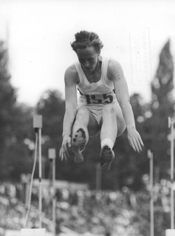 Margrit Herbst Zentralbild Kutscher 05.07.1970-str-Erfurt: XXI.DDR-Leichtathletik-Meisterschaften vom 03.-05.07.1970 - 3.Tag-Margit Herbst (SC Magdeburg) , DDR-Rekordhalterin im Fünfkampf, wurde neue Meisterin im Weitsprung. Sie begann die Konkurrenz gleich mit der Rekordweite von 6,61 m, mit der sie den DDR-Rekord von Burghild Wieczorek (SC DHfK Leipzig) im 4 cm verbessertr.